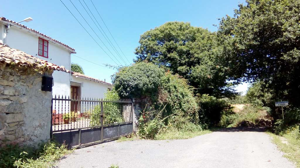 Vista da Graña, A Coruña.